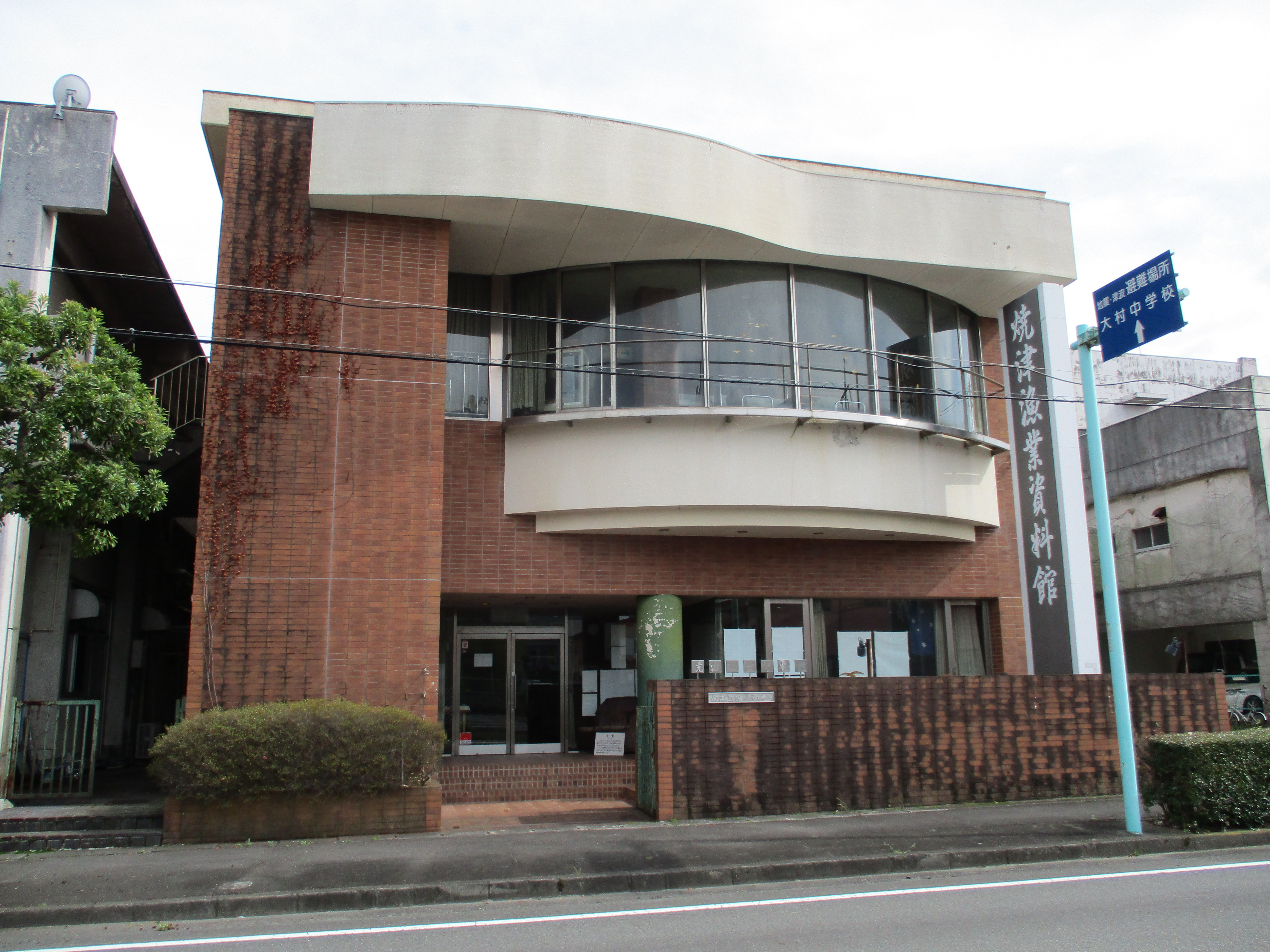 静岡県焼津市の焼津漁業資料館